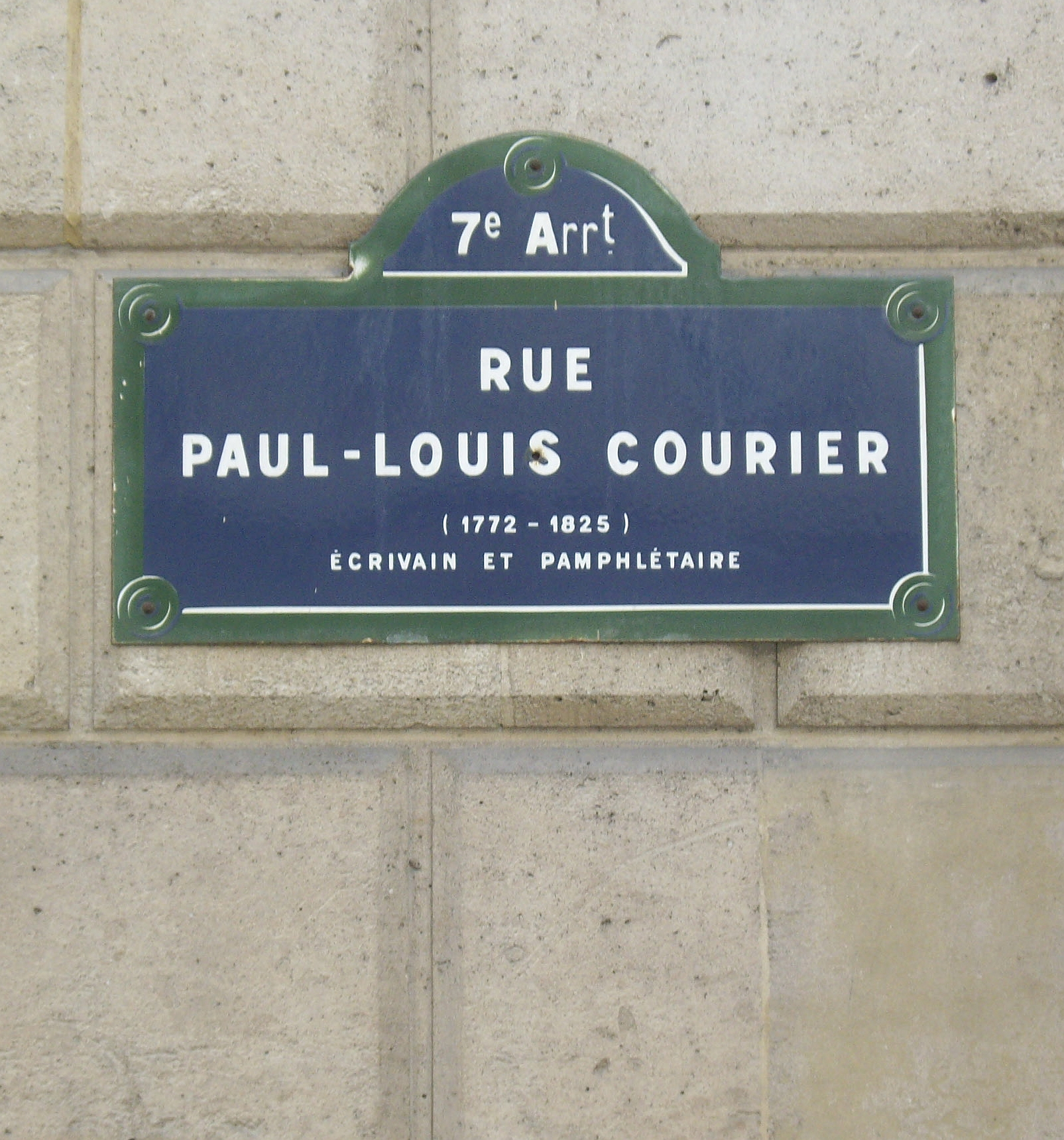 Rue Paul-Louis-Courier, Paris, 7e.